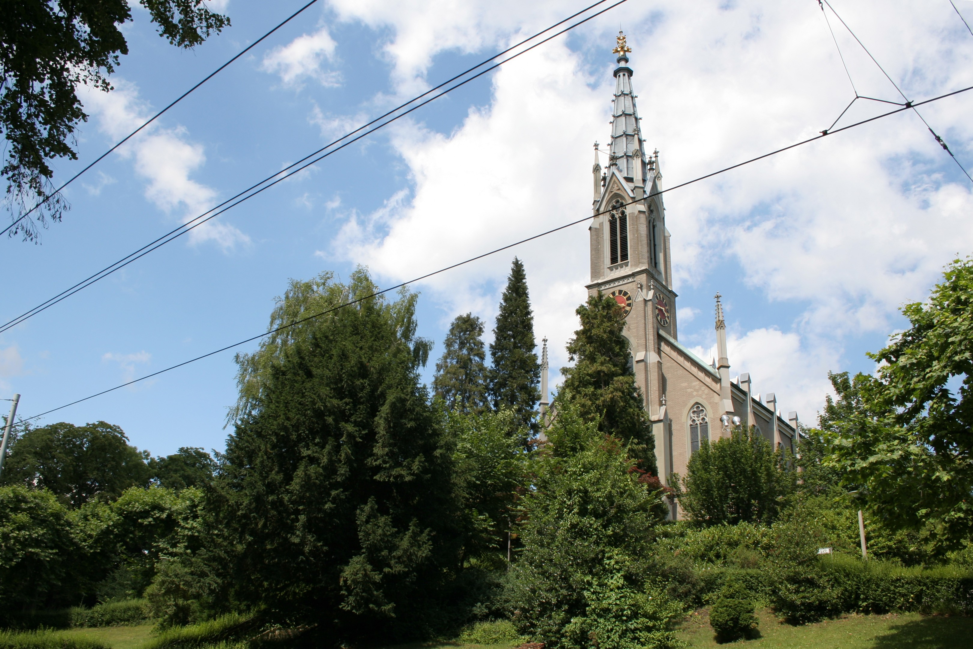 Kirche Unterstrass mit Park, von der Weinbergstrasse aus gesehen (Zürich, Schweiz)